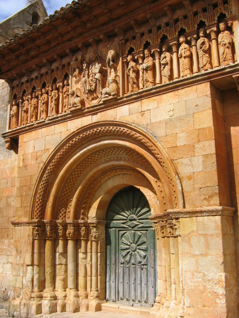 Iglesia de San Juan de Moarves de Ojeda (Palencia), último tercio del S XII.